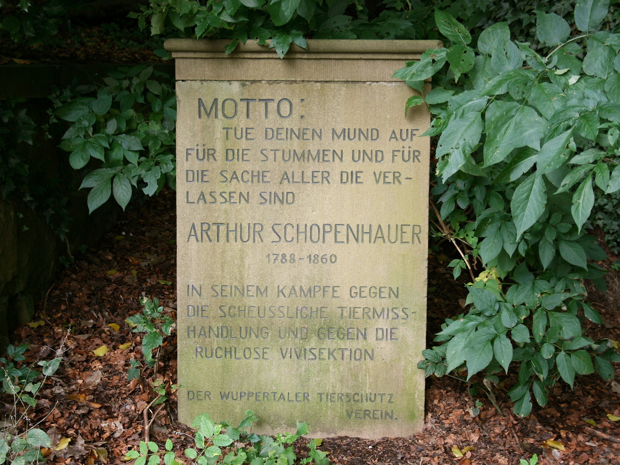 Barmer Anlagen in Wuppertal-Barmen